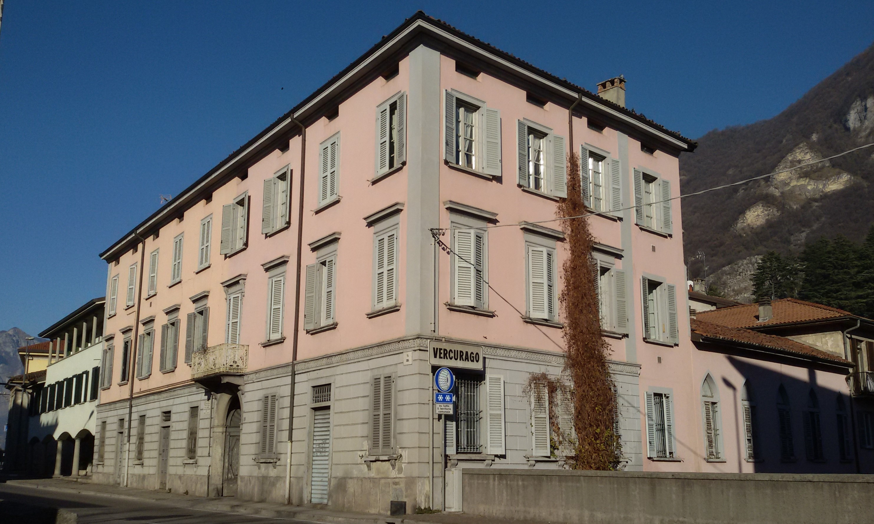 Palazzo che ospitò l'Istituto per frenastenici fondato da Gonelli-Cioni posto sul confine con Calolzio